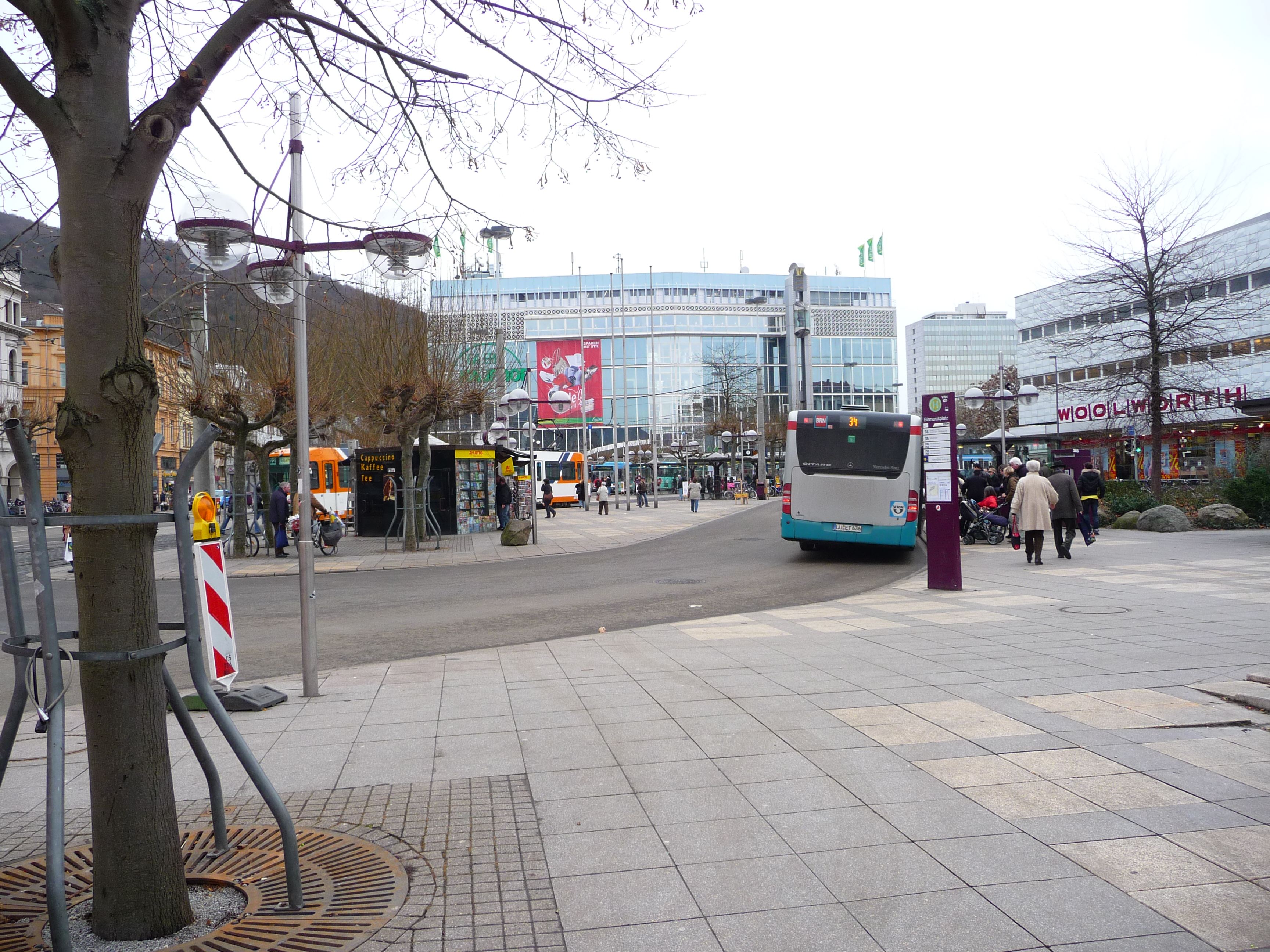 Bismarckplatz in Heidelberg (Deutschland), von Norden